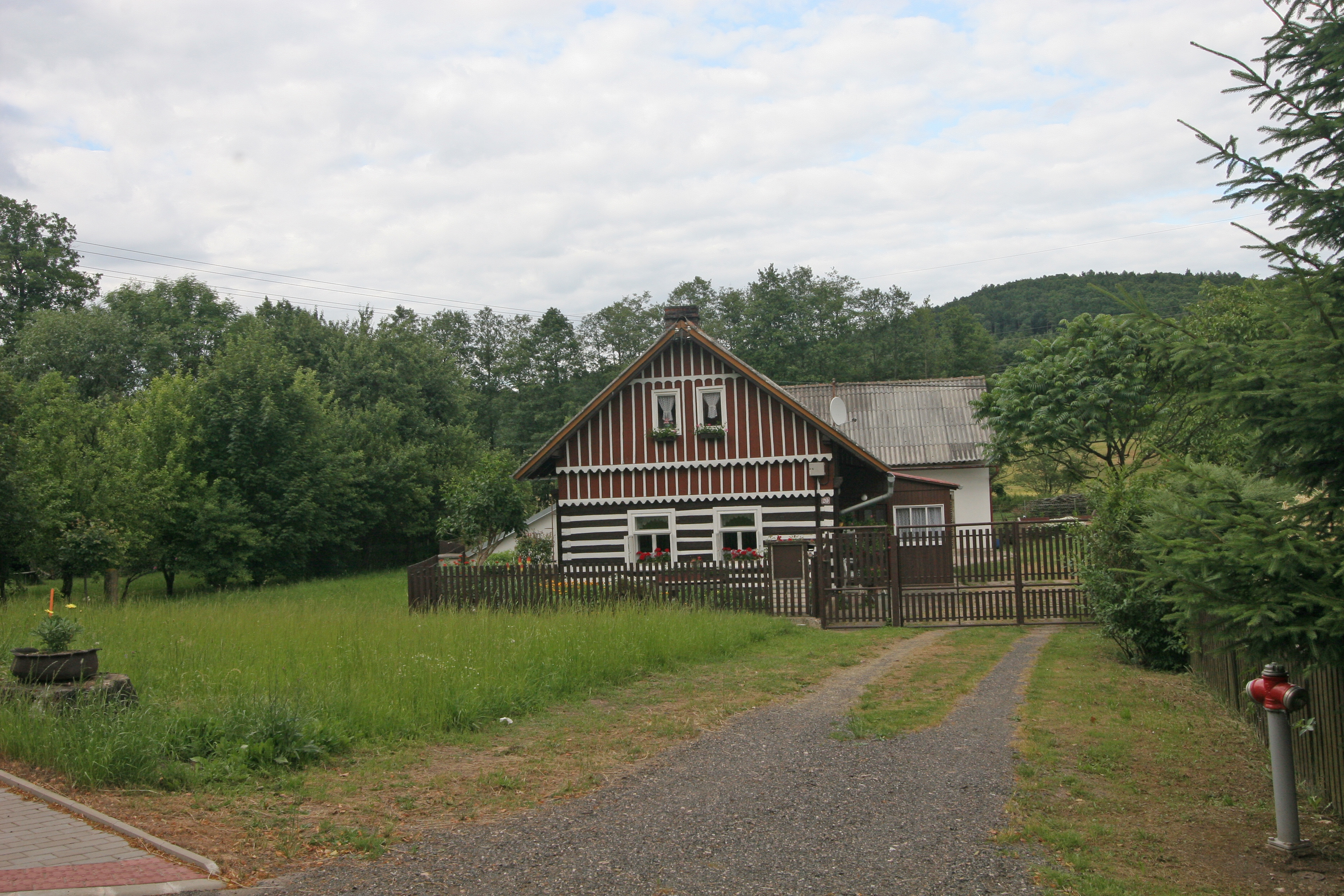 Miřejov čp. 20